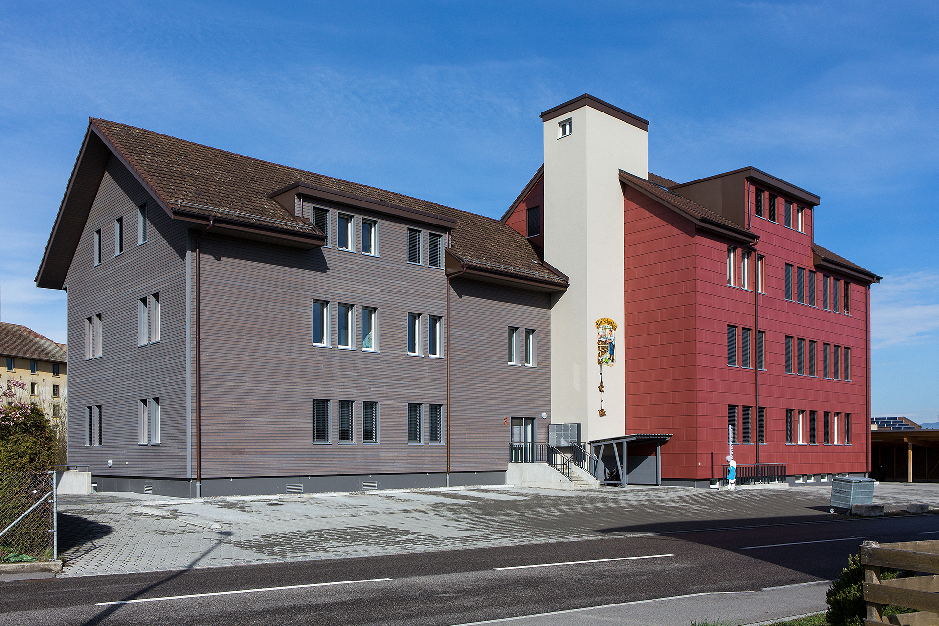 Ehemalige "Schuemi" (Schuhfabrik Karl Jordan AG) in Brittnau (AG)